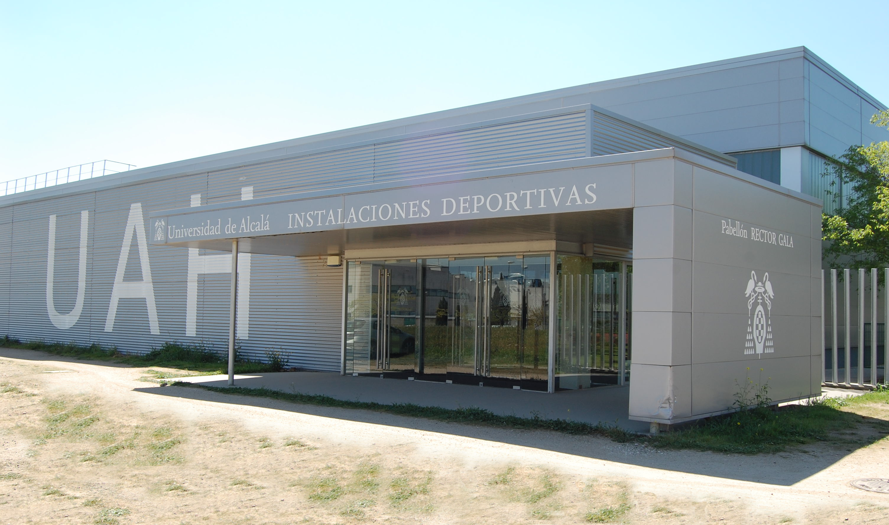 El Pabellón Rector Gala es una de las instalaciones deportivas situadas en el Campus Científico Tecnológico de la Universidad de Alcalá (Alcalá de Henares - Comunidad de Madrid - España). Está dotado con 5 salas multifuncionales. Fue inaugurado el 14 de diciembre de 2006.